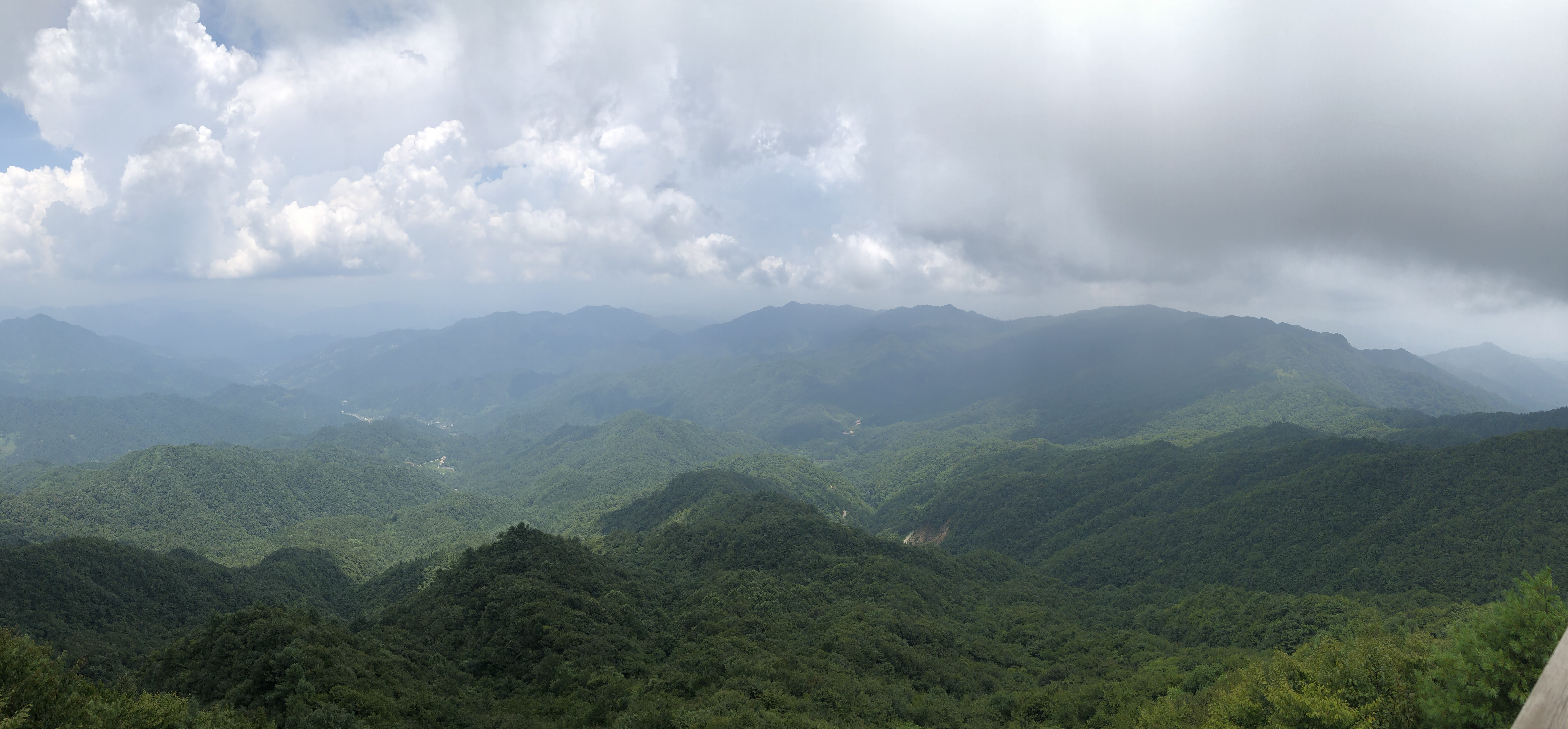 中文（中国大陆）: 大老岭国家森林公园